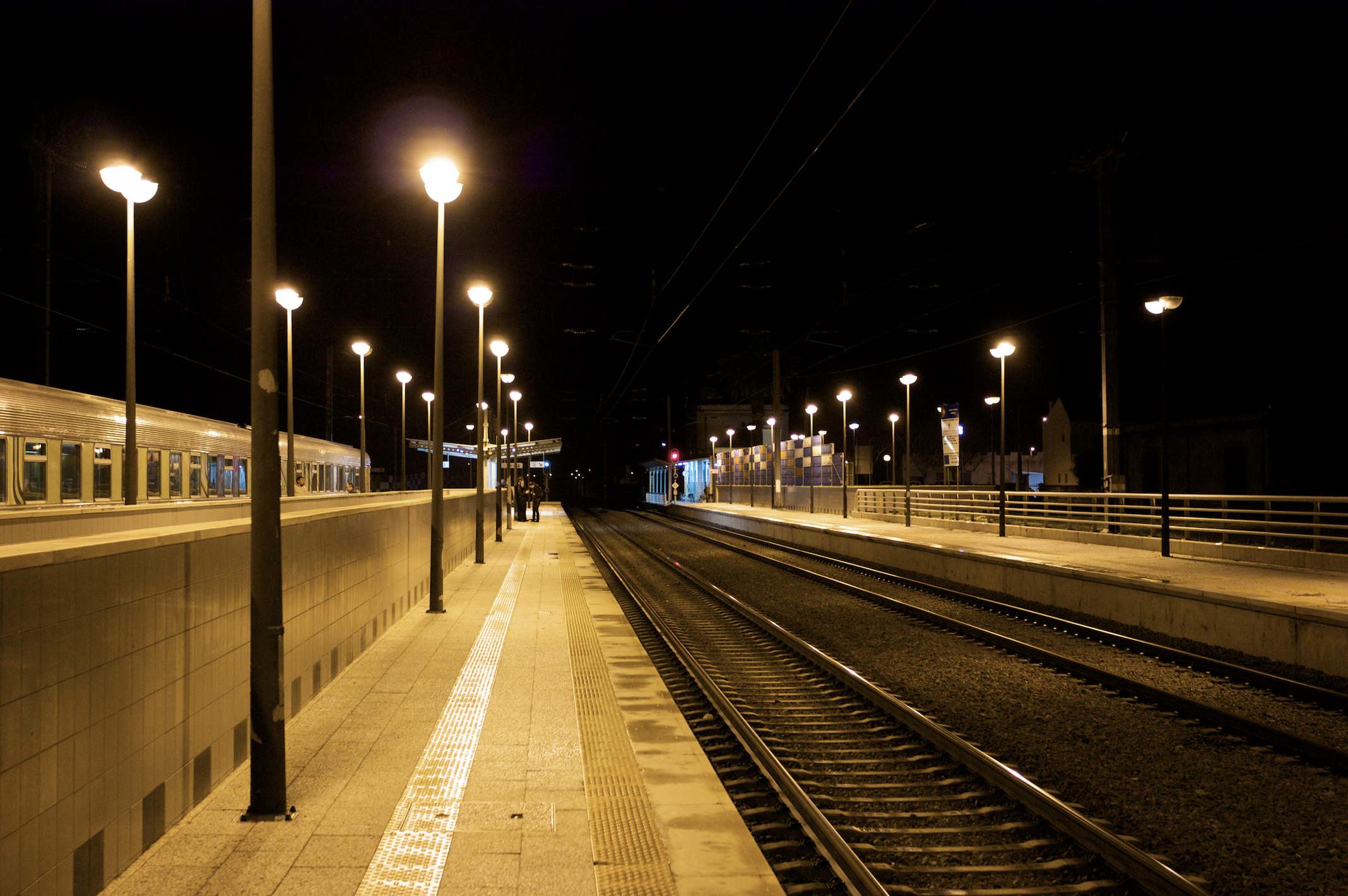 Tipo: ES [Estação Satélite] Local: Grândola [Linha do Sul, PK 102] Data e hora: 3 de Fevereiro de 2010 [19h06]